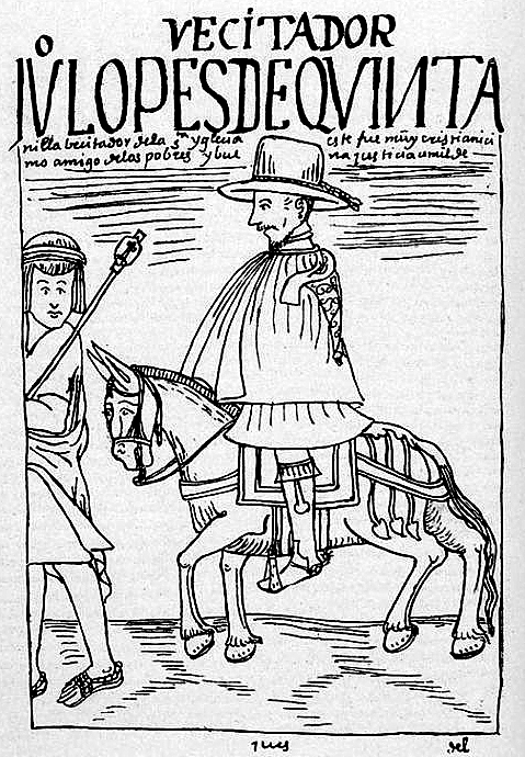 El Maestre de Campo español Ginés de Lillo fue nombrado en 1603 como visitador de tierras entre el pueblo de los Cauquenes hasta el pueblo de Choapa en el actual territorio de Chile.[1]